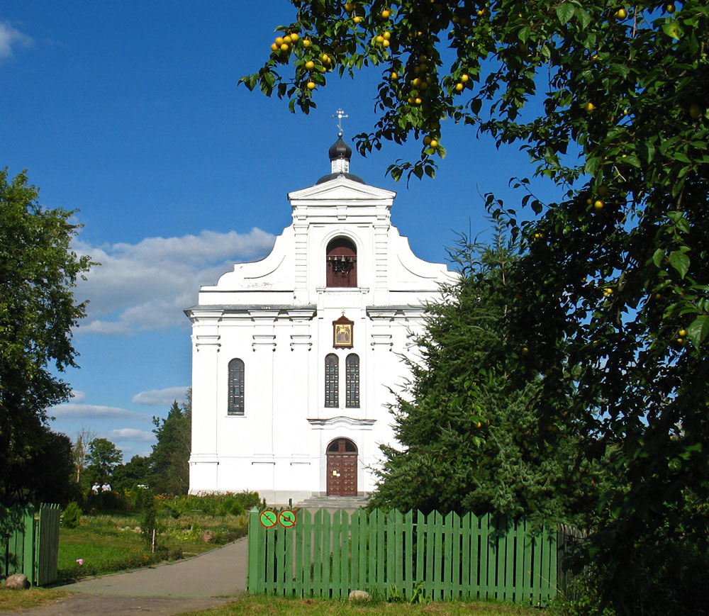 Беларуская (тарашкевіца): Малыя Ляды (Małyja Lady)